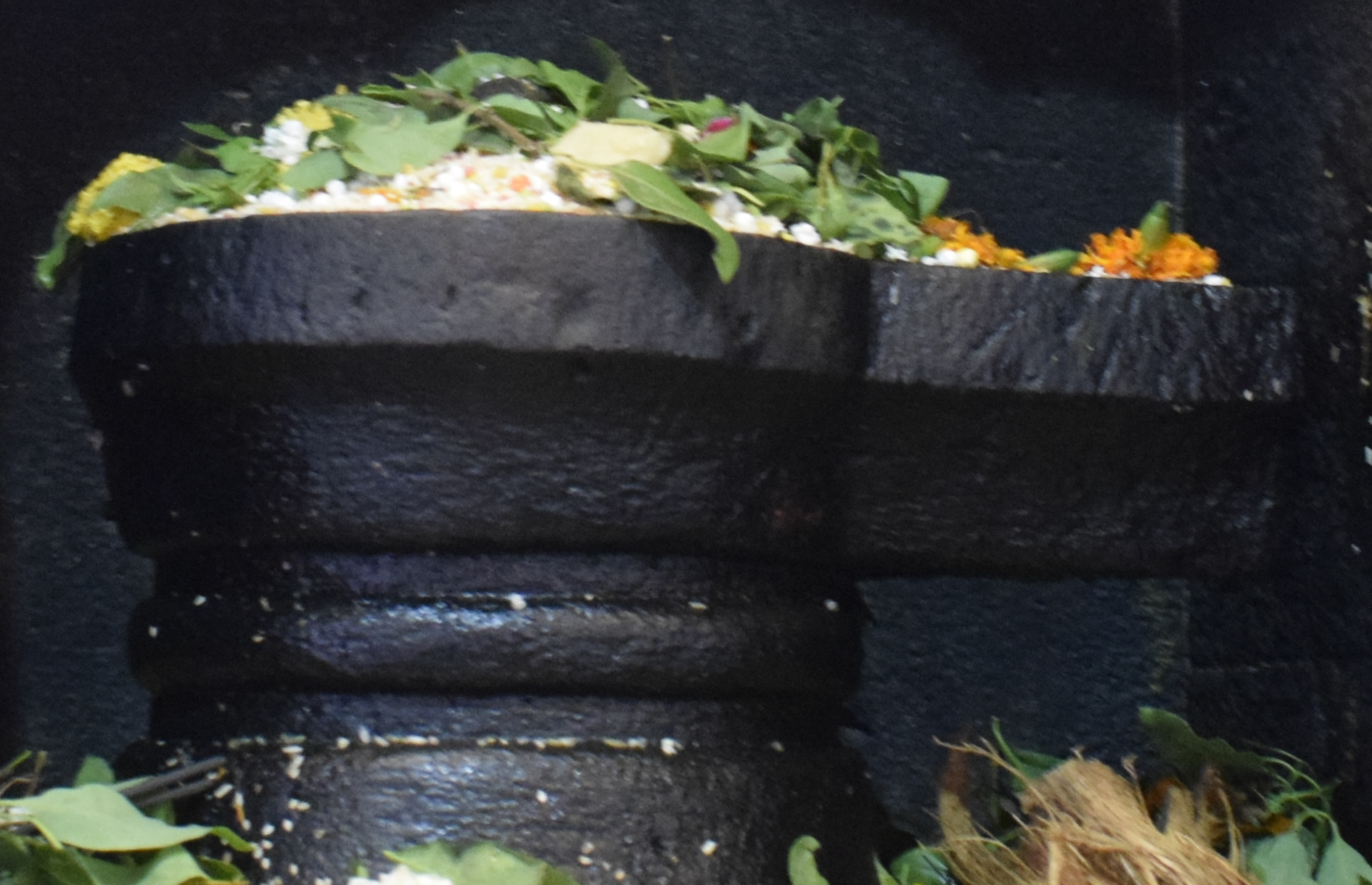 श्री आलेश्वर लिंग